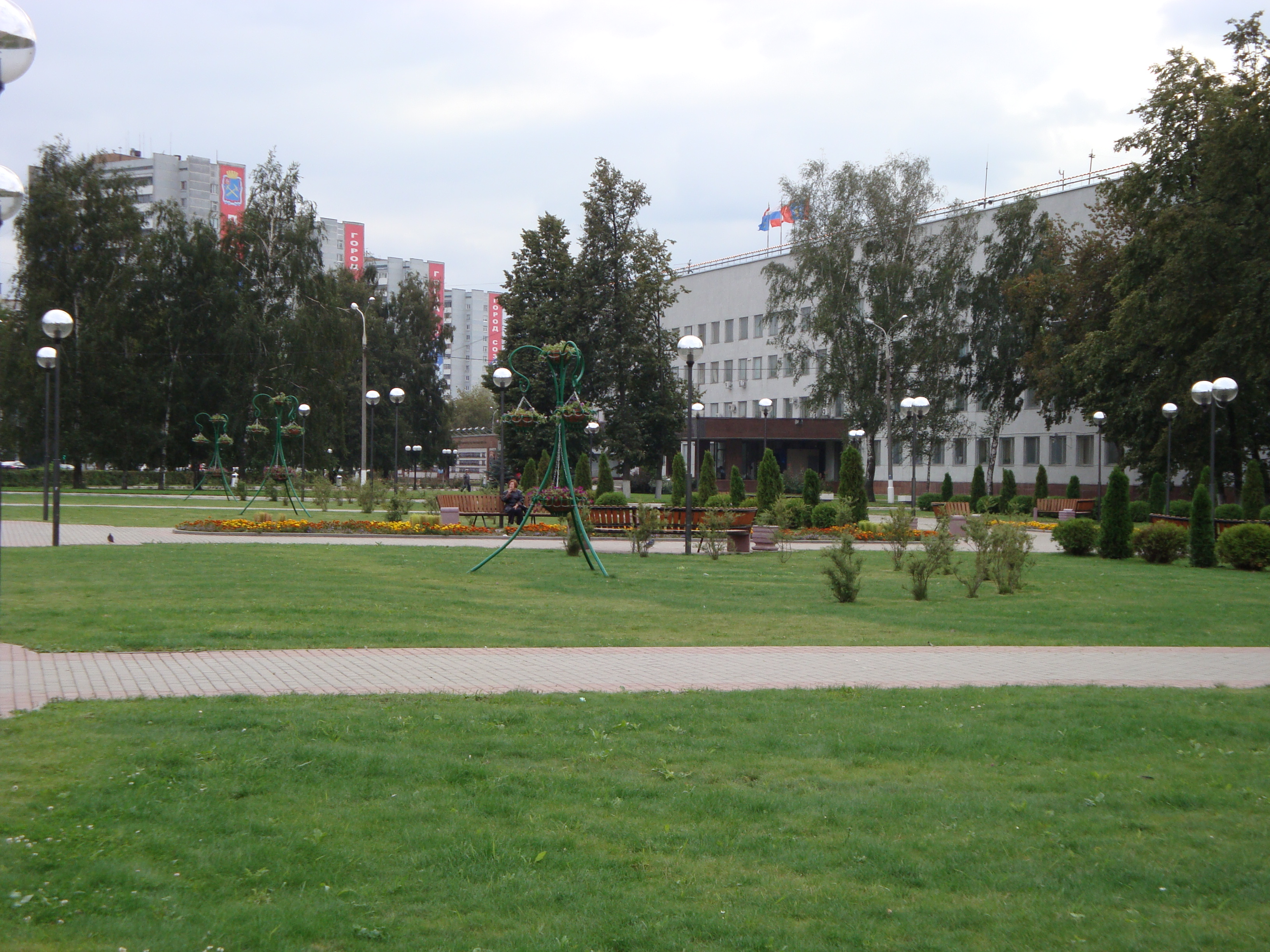 Сквер на площади Ленина в Подольске